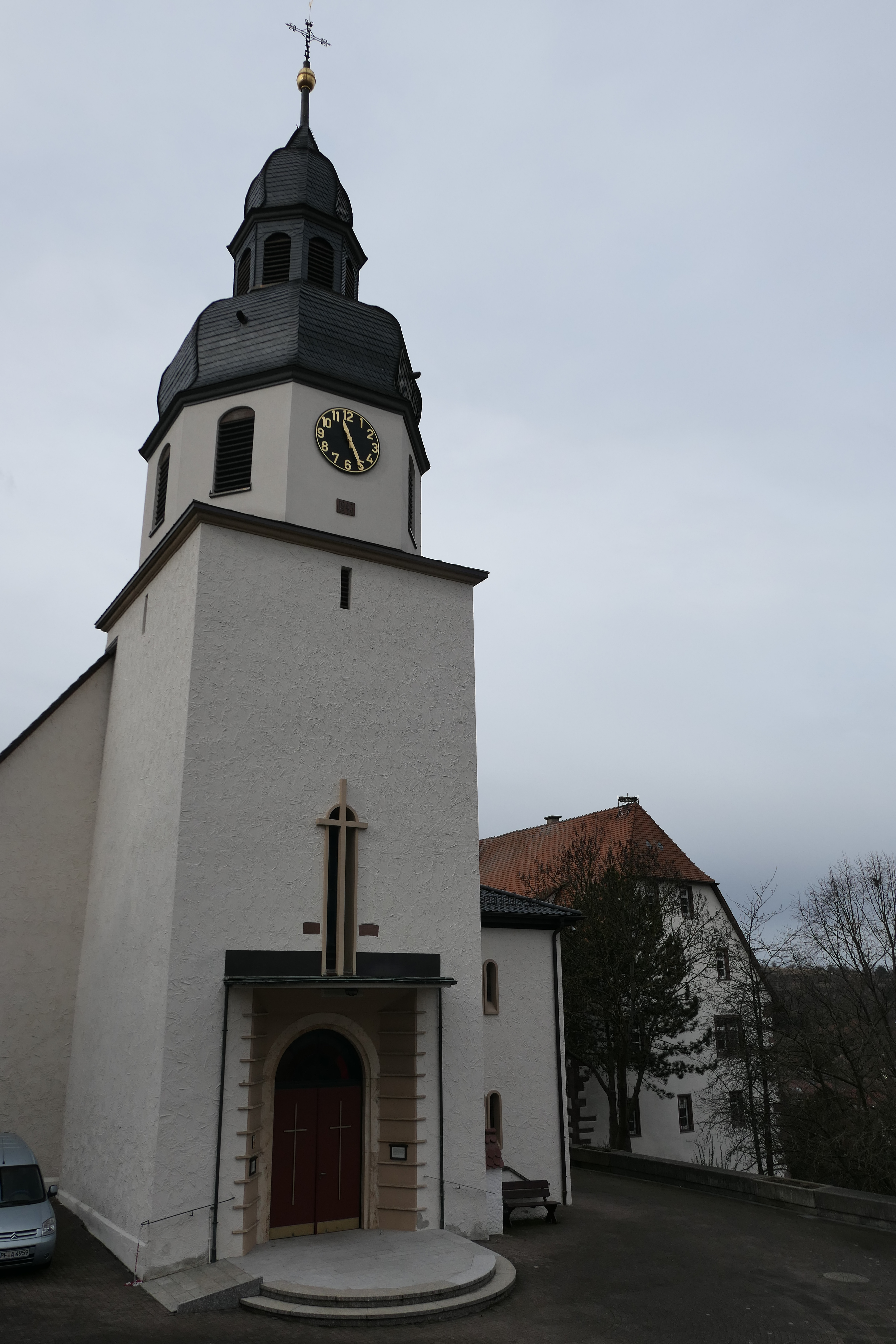 Ersingen ehem. Johannes Baptistae Kirchenburg quadratischer Turmschaft vor 1258 Ansicht Ost